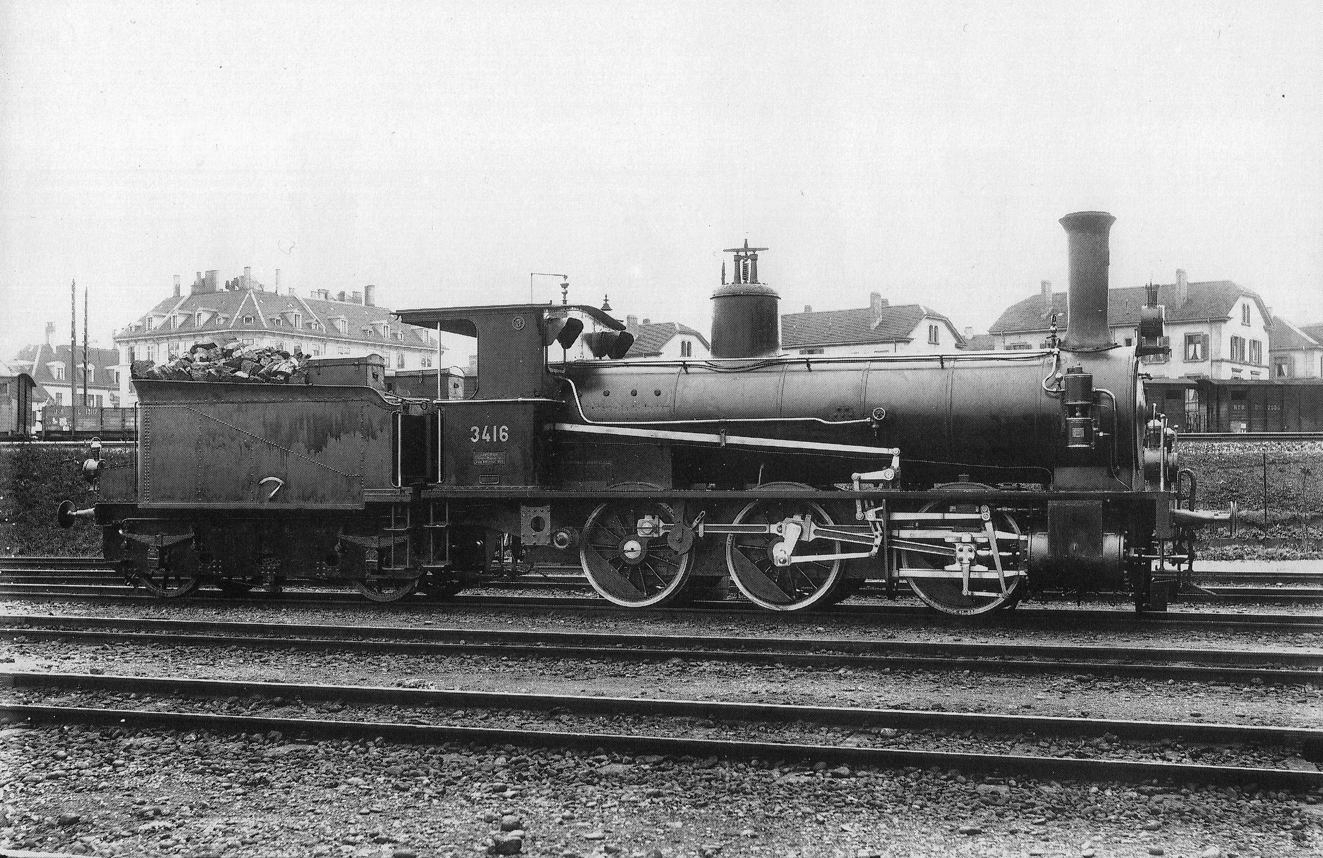 Güterzuglocomotive Nr. 3416 des Typs D 3/3 der Schweizeriſchen Bundesbahnen mit Schlepp-Tender, bis 1902 C3T Nr. 376 der Schweizeriſchen Nordoſtbahn, gebaut 1895 inn der Schweizeriſchen Locomotiv- und Machines-Fabrique zů Winterthur (Fabr.-Nr. 938), 1911 außer Dienſt geſtellt und anſchließend abgebrochen; aufgnommen um 1903 im Fahrzeug-Dépôt F zů Zürich.